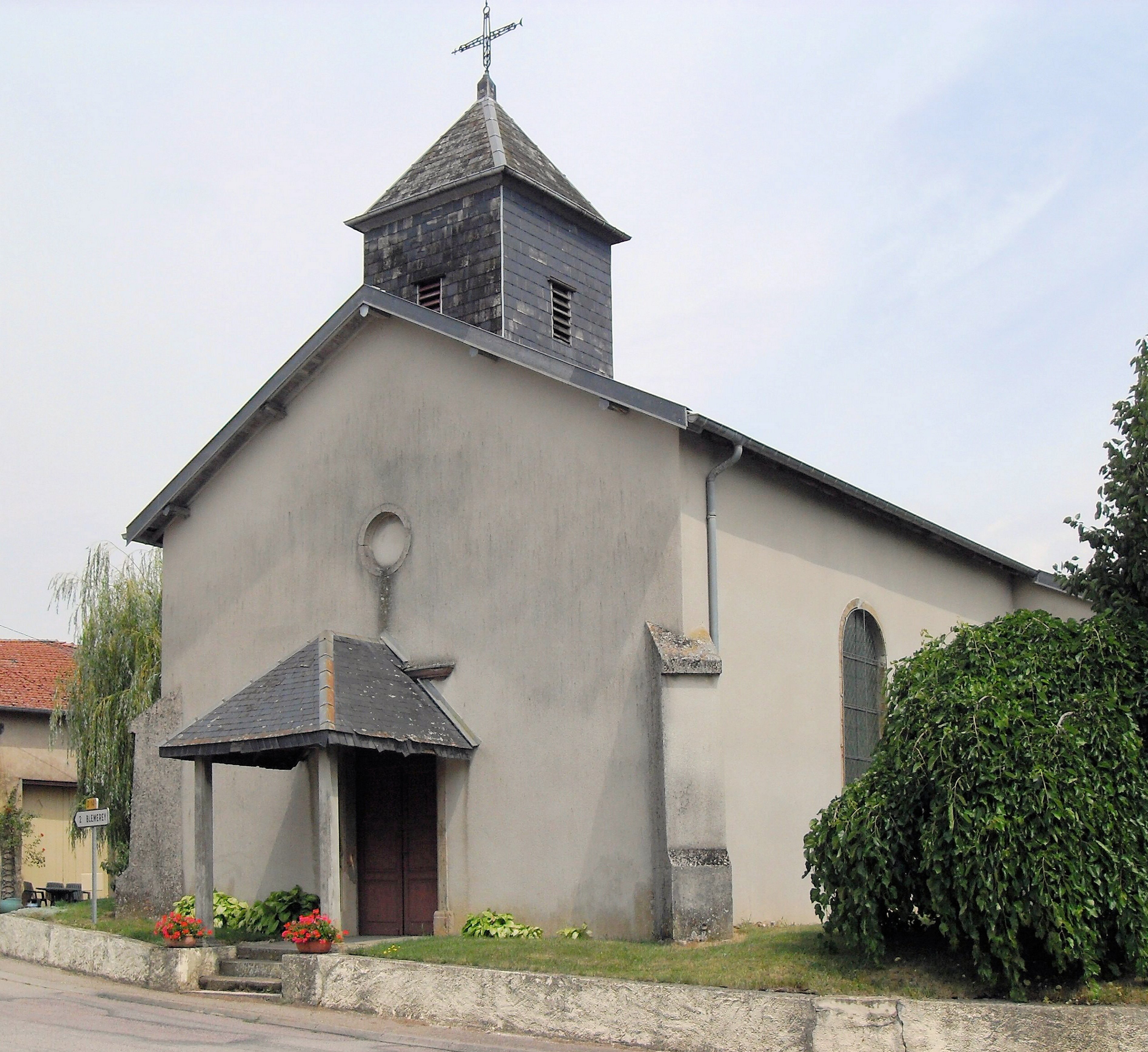 L'église Saint-Élophe à Frenelle-la-Petite